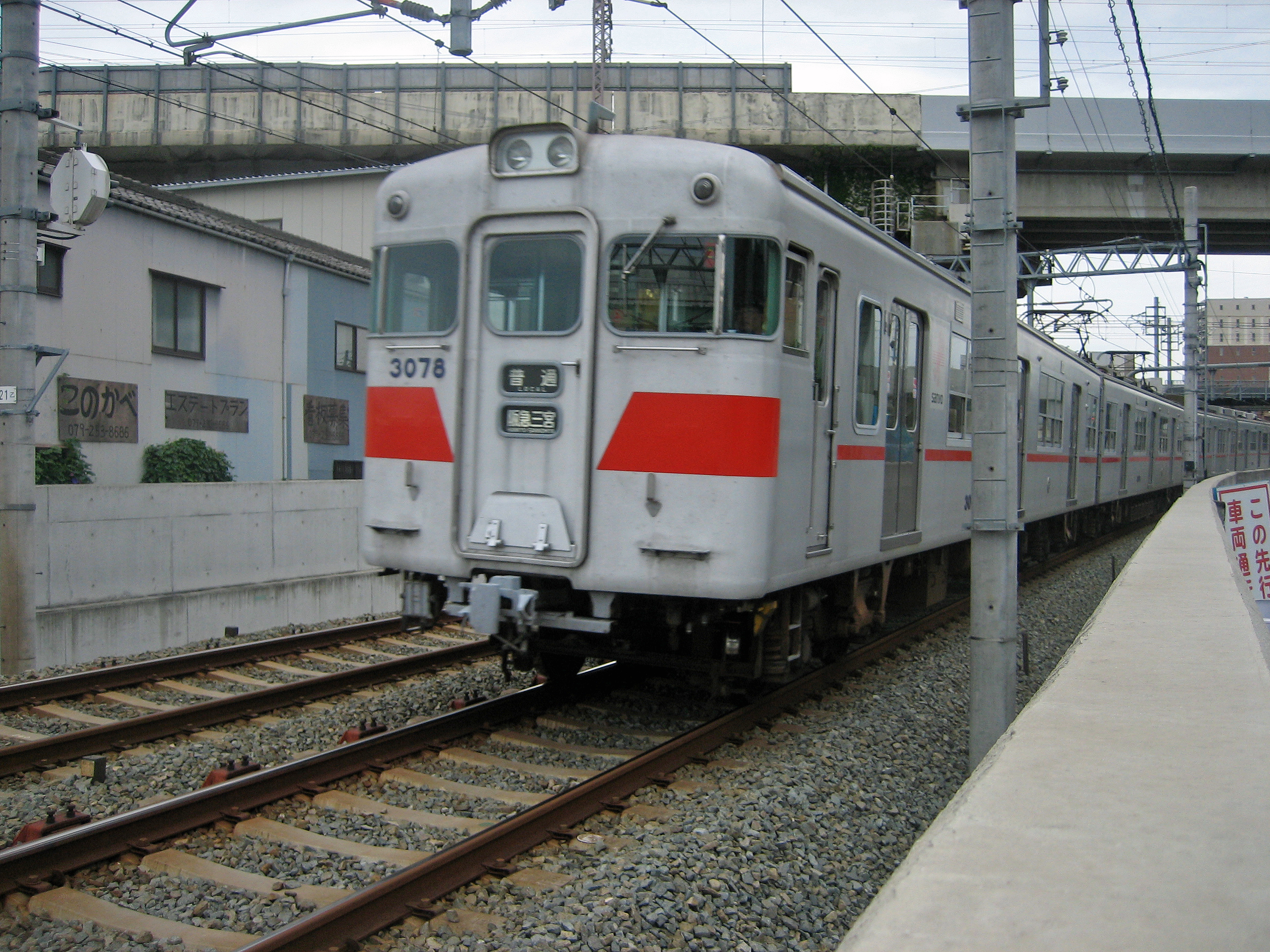 山陽電気鉄道3000系電車。